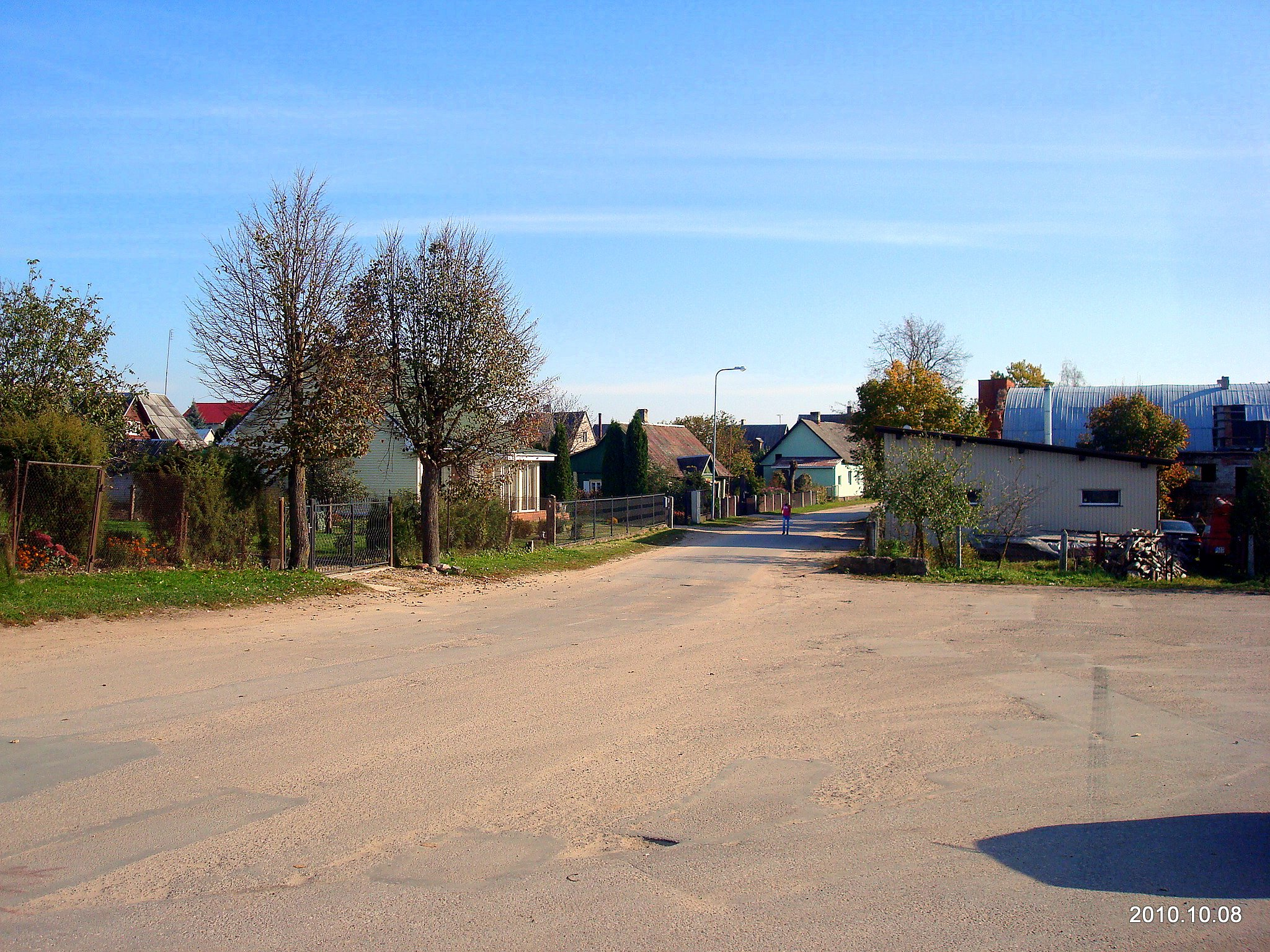 ул.Шв.Антано